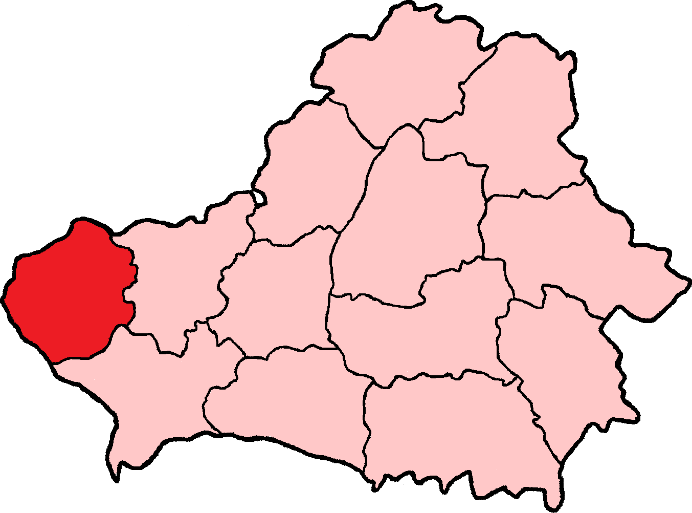 Położenie obwodu białostockiego na mapie BSRR w 1944 r.